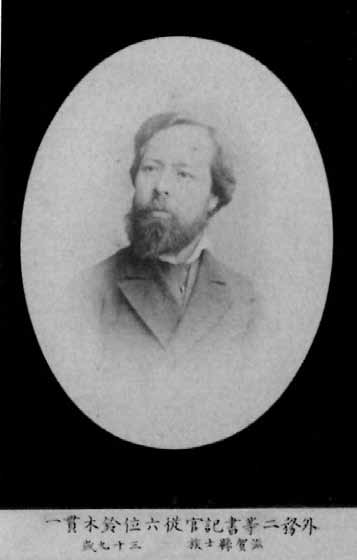 外務二等書記官従六位鈴木貫一 滋賀県士族 三十九歳 宮内庁三の丸尚蔵館編『明治十二年明治天皇御下命「人物写真帖」：収蔵品目録写真（三の丸尚蔵館収蔵品目録No.1-1）』上（宮内庁、 二〇一五年）二六頁。